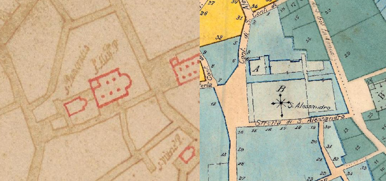 Chiesa di Sant'Alessandro in Zebedia rispettivamente nella mappa della città dell'anno 1579 e nel 1751